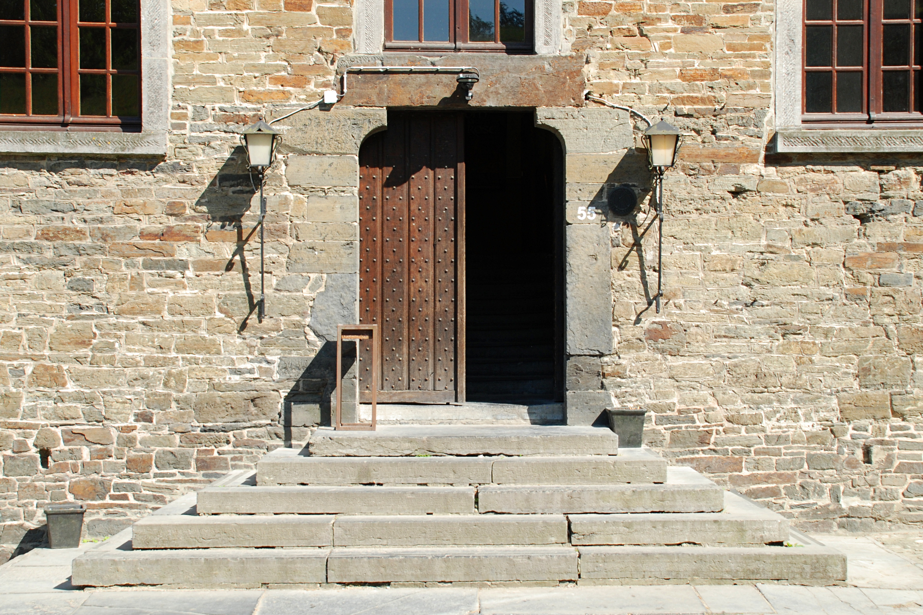 Belgique- Brabant wallon - Villers-la-Ville - ancien moulin abbatial